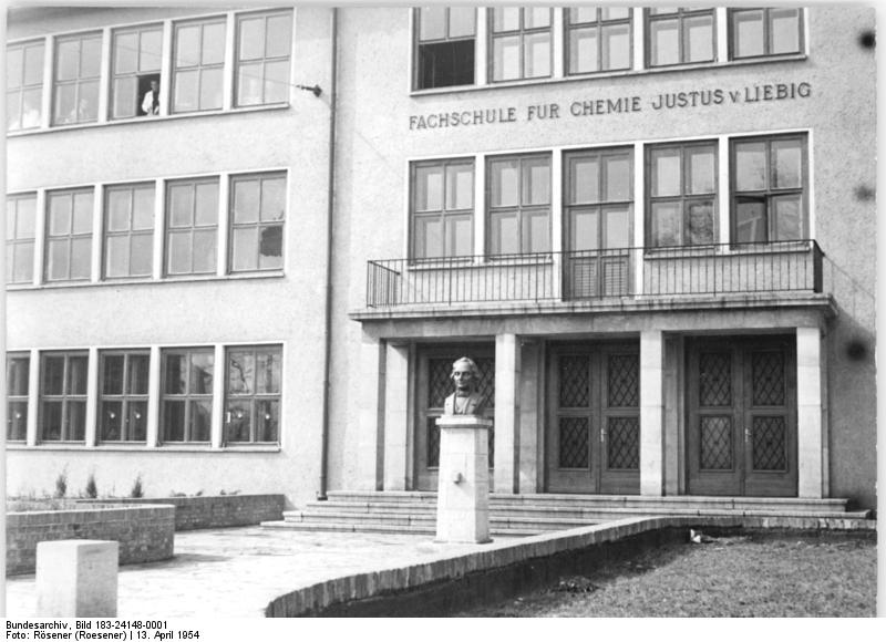 Zentralbild-Rösener Wjtk-Wi. 13.4.1954 Fachschule für Chemie "Justus von Liebig" in Magdeburg-Südost Um weitere hervorragende Kader für die chemische Industrie und die Chemieforschung heranzubilden, wurde in Magdeburg-Südost eine Fachschule für Chemie erbaut, die jetzt den Betrieb aufnahm. Sie erhielt den Namen des grossen deutschen Chemikers und Forschers "Justus von Liebig". UBz, Eingang zur Fachschule für Chemie mit der Büste Justus von Liebig."